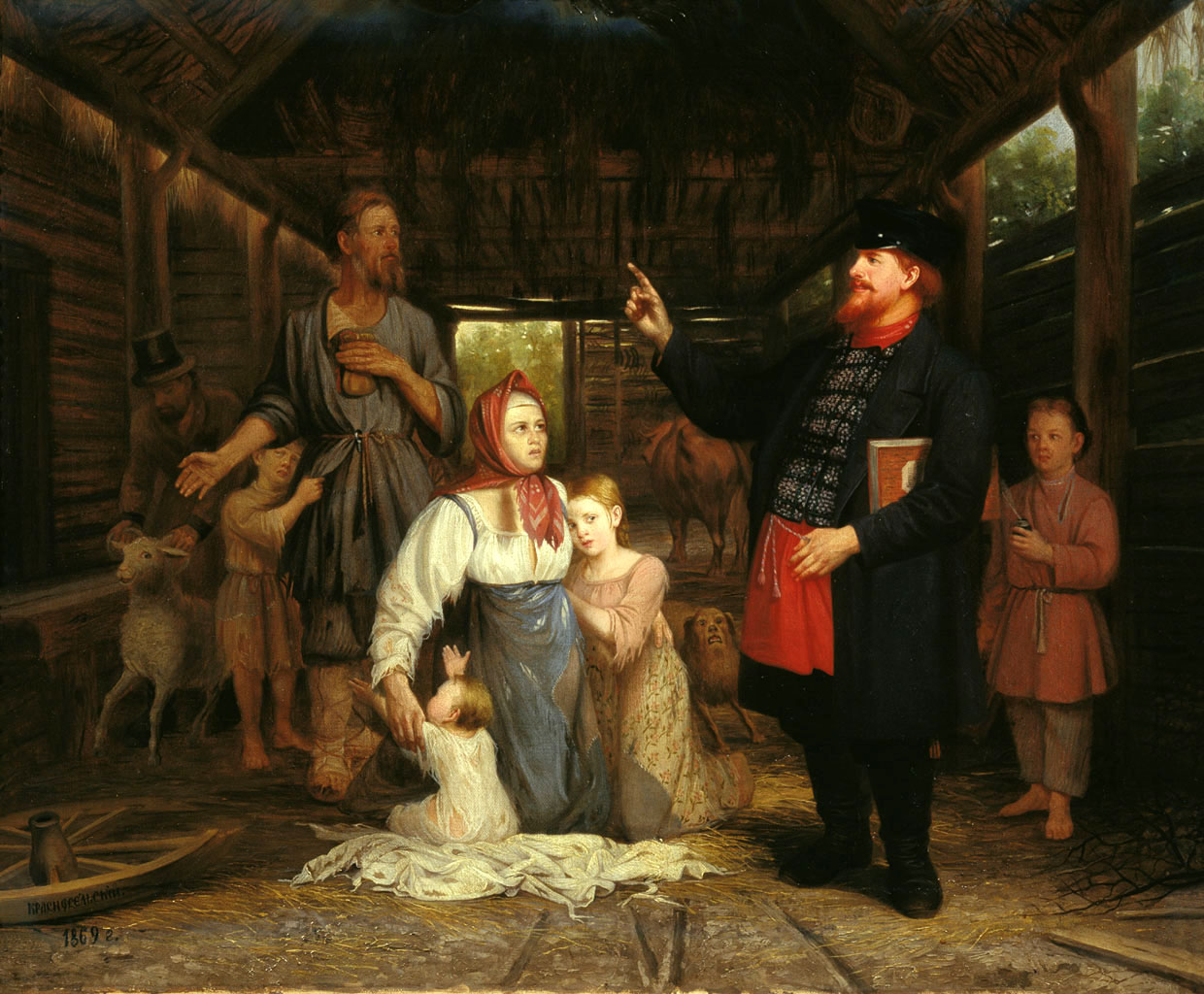 Красносельский Александр Андреевич. «Сбор недоимок».1869. Холст, масло. Вольский краеведческий музей